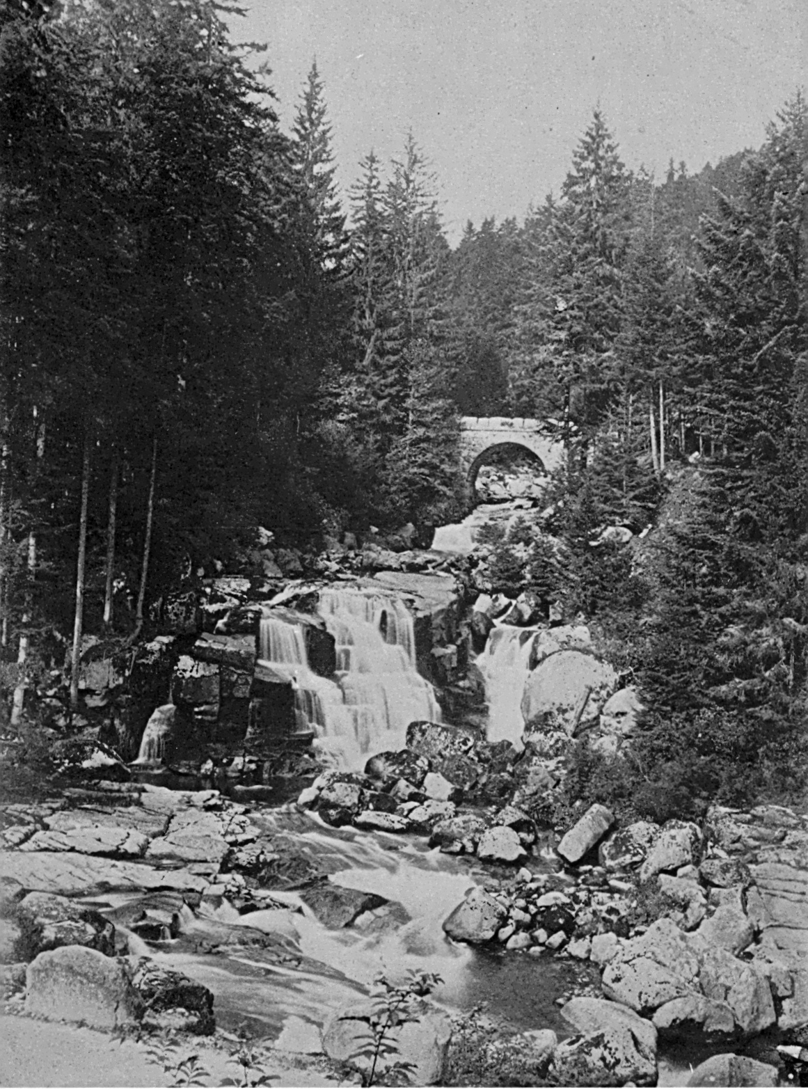 Raumuenzacher Wasserfall des Schwarzenbachs an der Muendung in die Raumuenzach, vor dem Bau des Murg-Schwarzenbach-Kraftwerks (Rudolf-Fettweis-Werk), Sinner-Archiv Nr. 6/136, 227*170mm